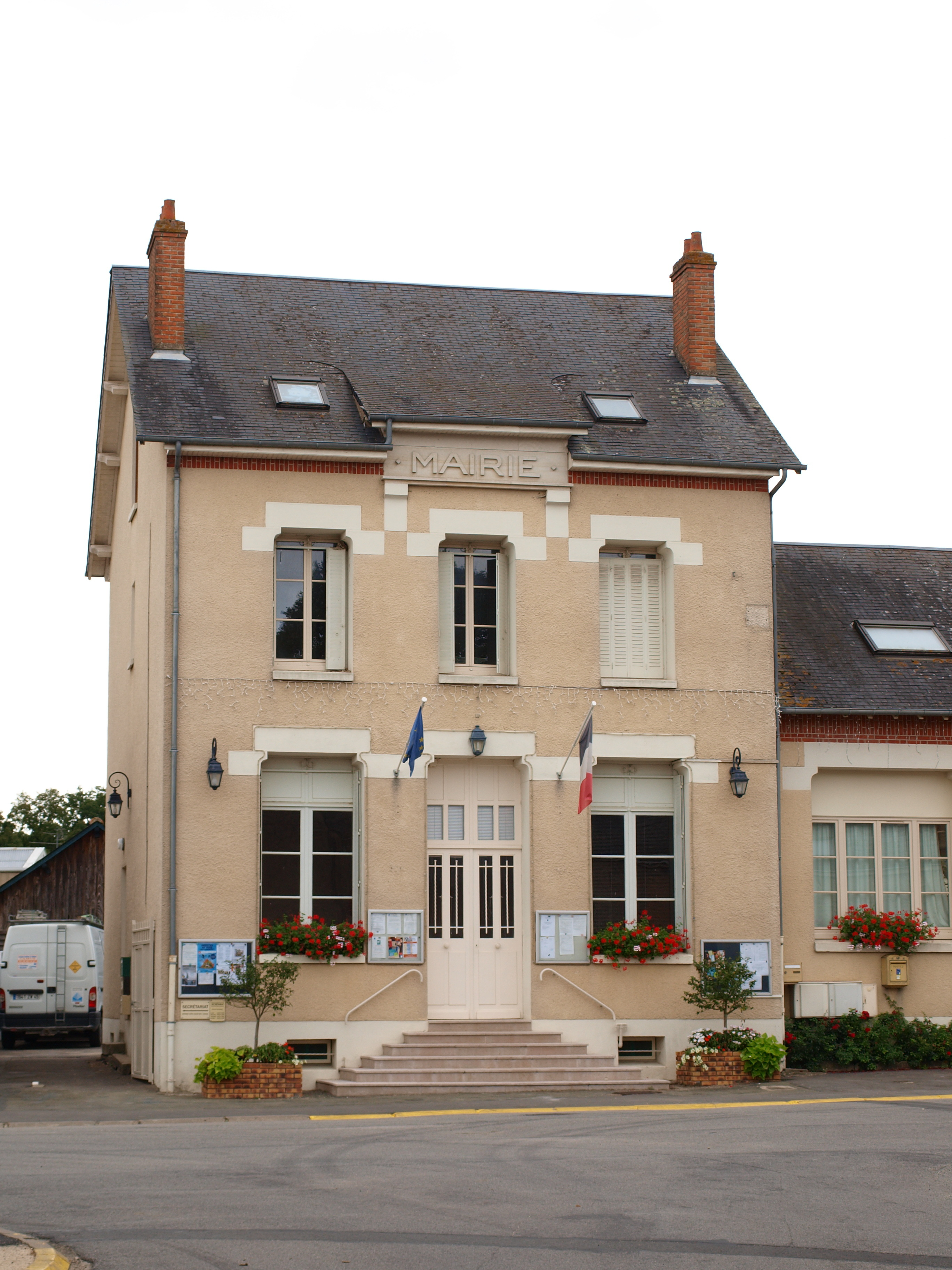 Coulmiers (Loiret, France) ; mairie